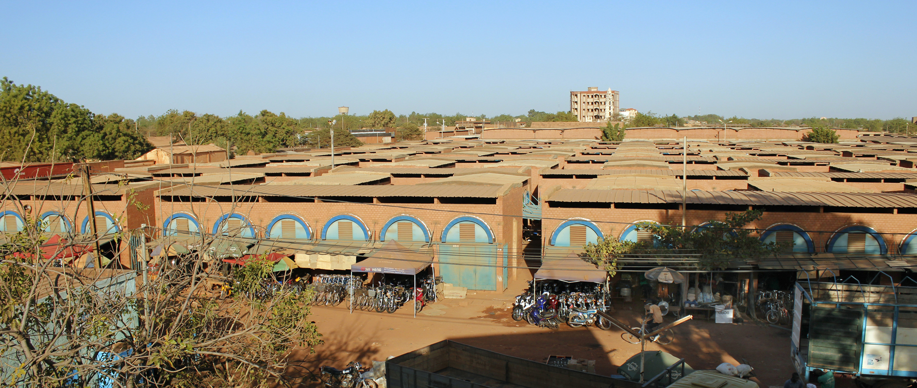 marché central de Koudougou